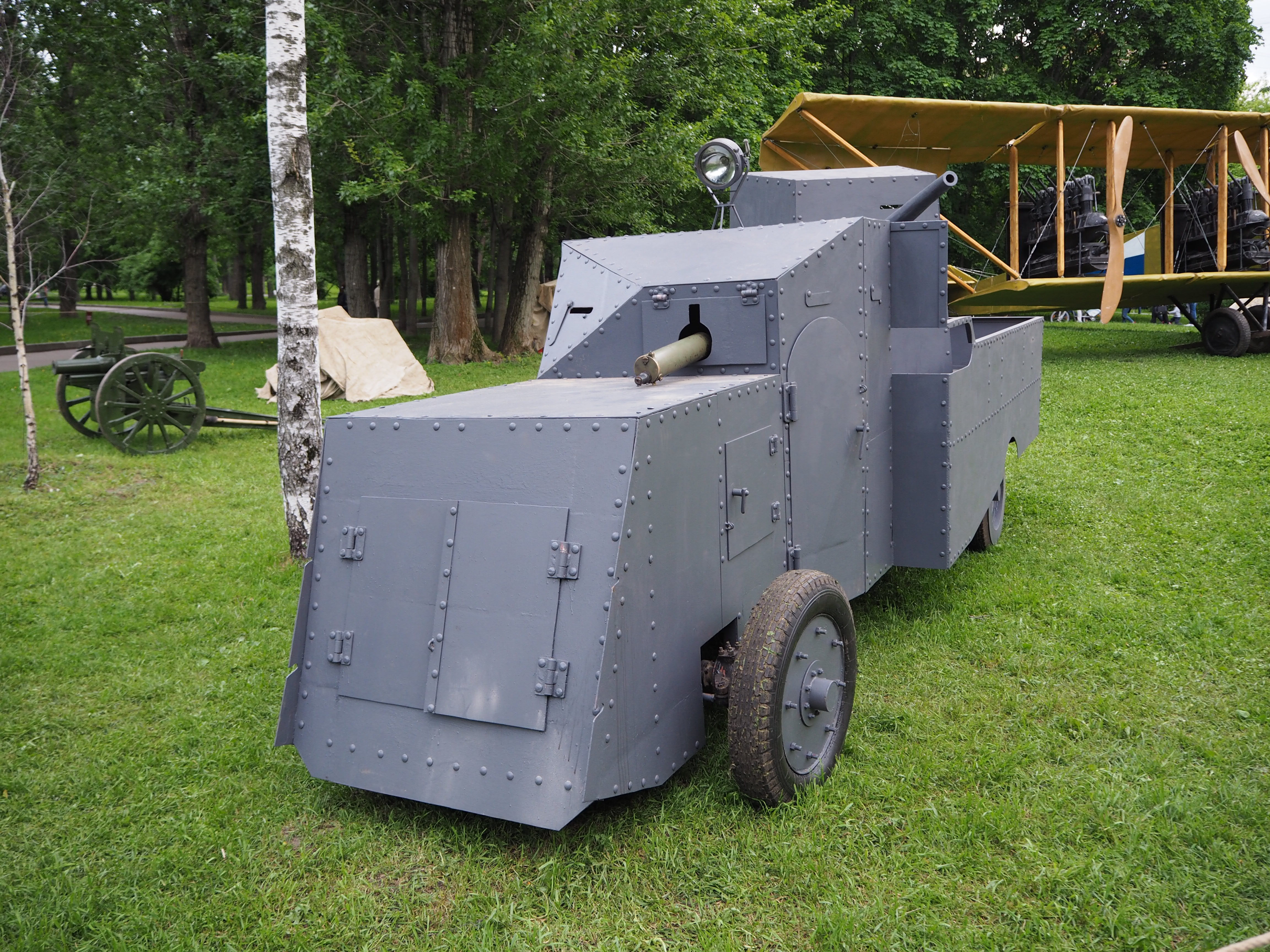 Фестиваль исторической реконструкции «Времена и эпохи. Собрание» в Мемориально-парковом комплексе героев Первой мировой войны.